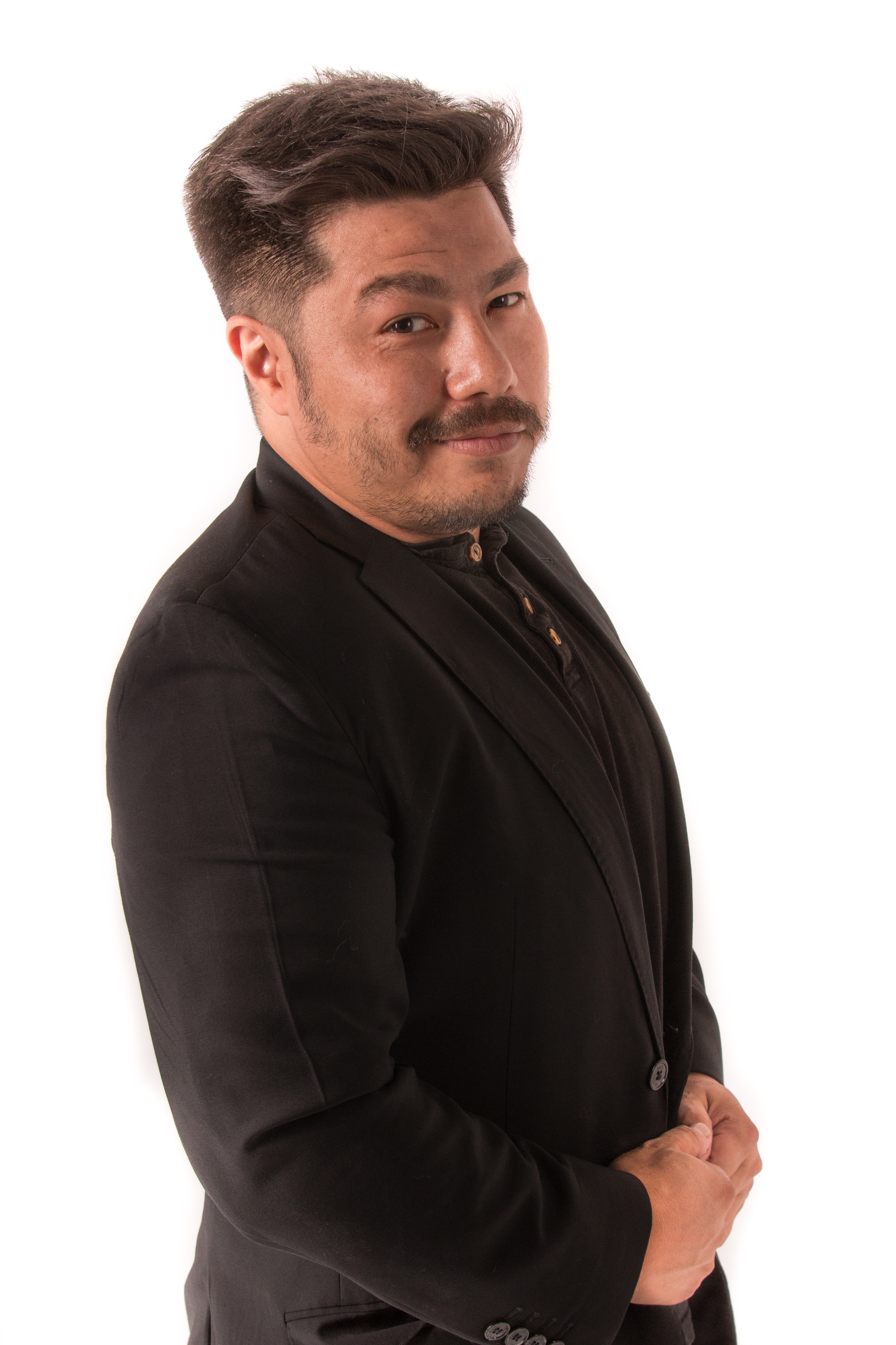 Foto del Actor, Director, Productor y guionista Óscar Reyes